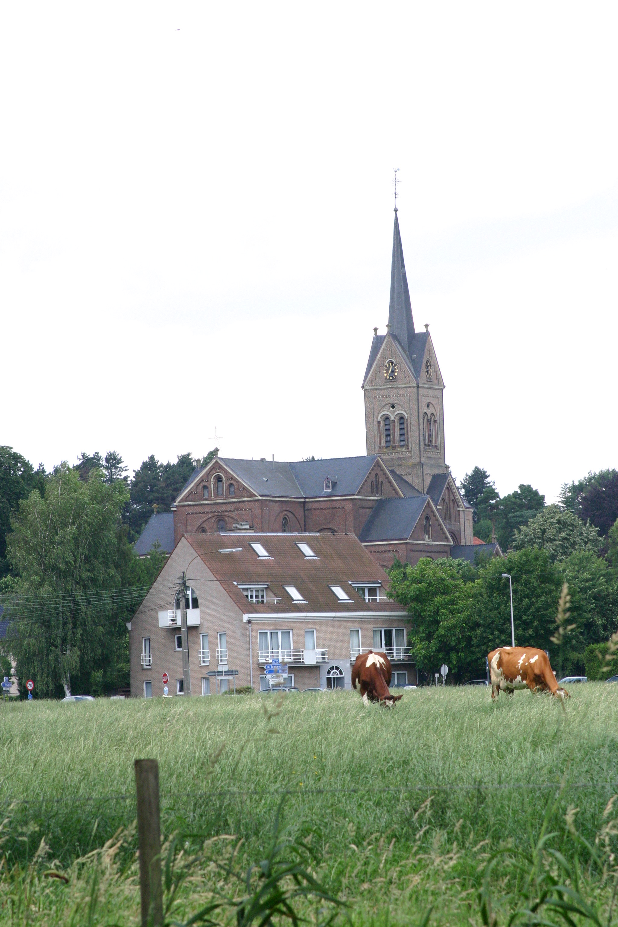 Vue op d'Kierch vu Lummen vum Mangelbeek aus gesinn.